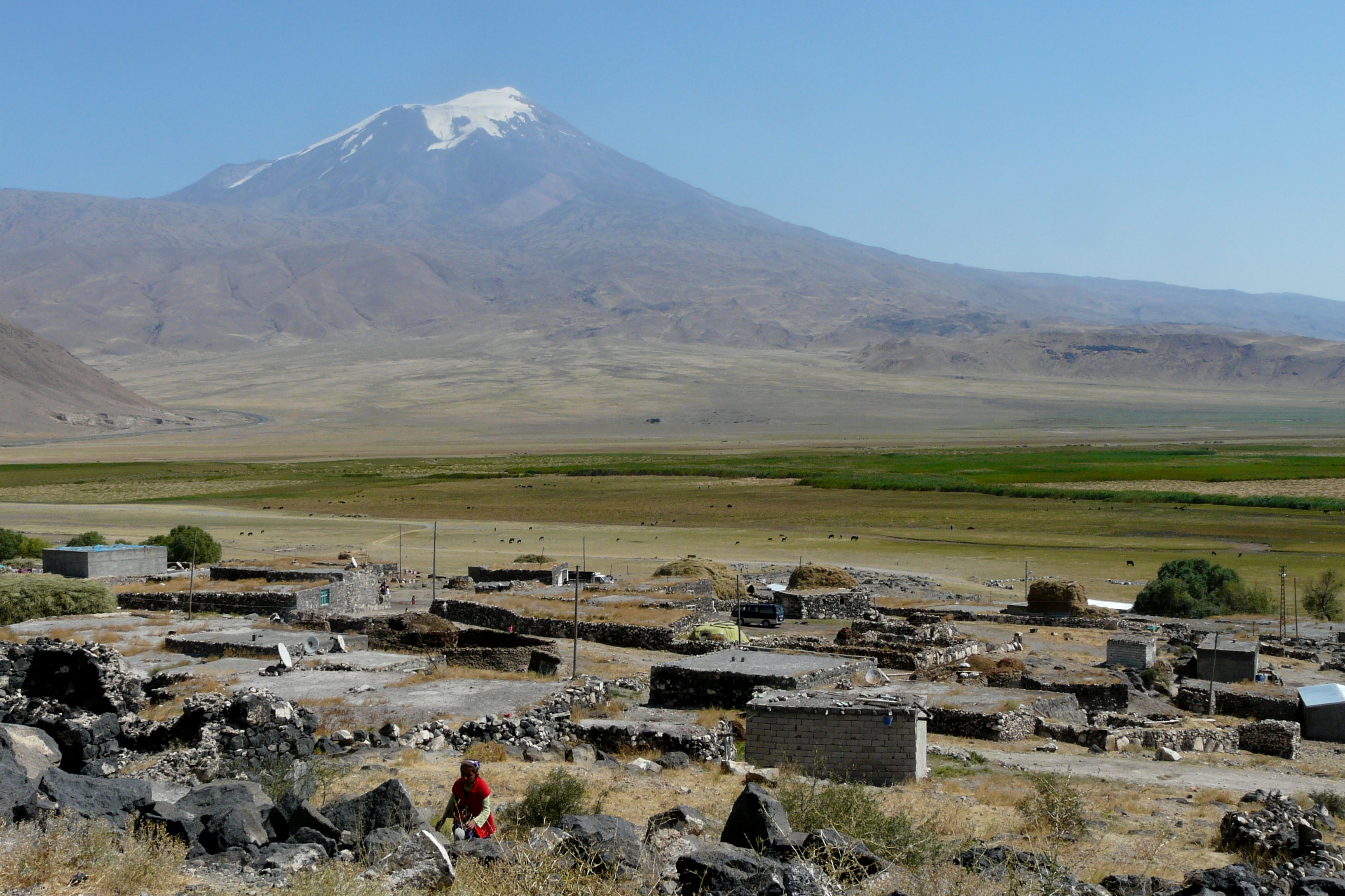 Von der türkischen Seite präsentiert sich der Ararat - verglichen mit der Ansicht von Armenien aus - gewissermaßen gespiegelt. Im Vordergrund ein kurdisches Dorf.